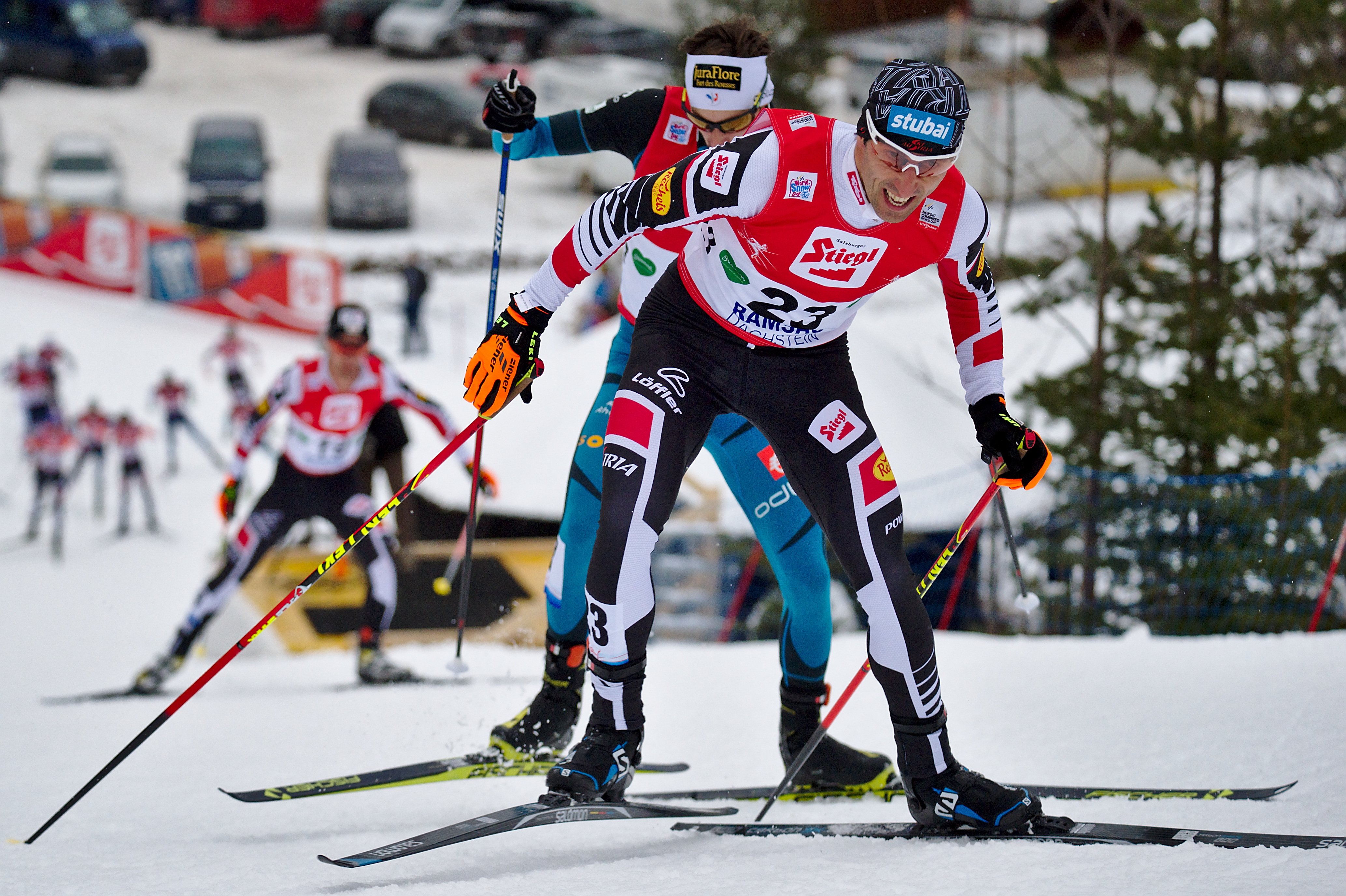 FIS Worldcup Nordic Combined Ramsau 2016. Bild zeigt Wilhelm Denifl (AUT)